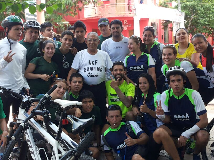 Ciclistas de Villa Hayes con el Sr. Lorenzo Prieto